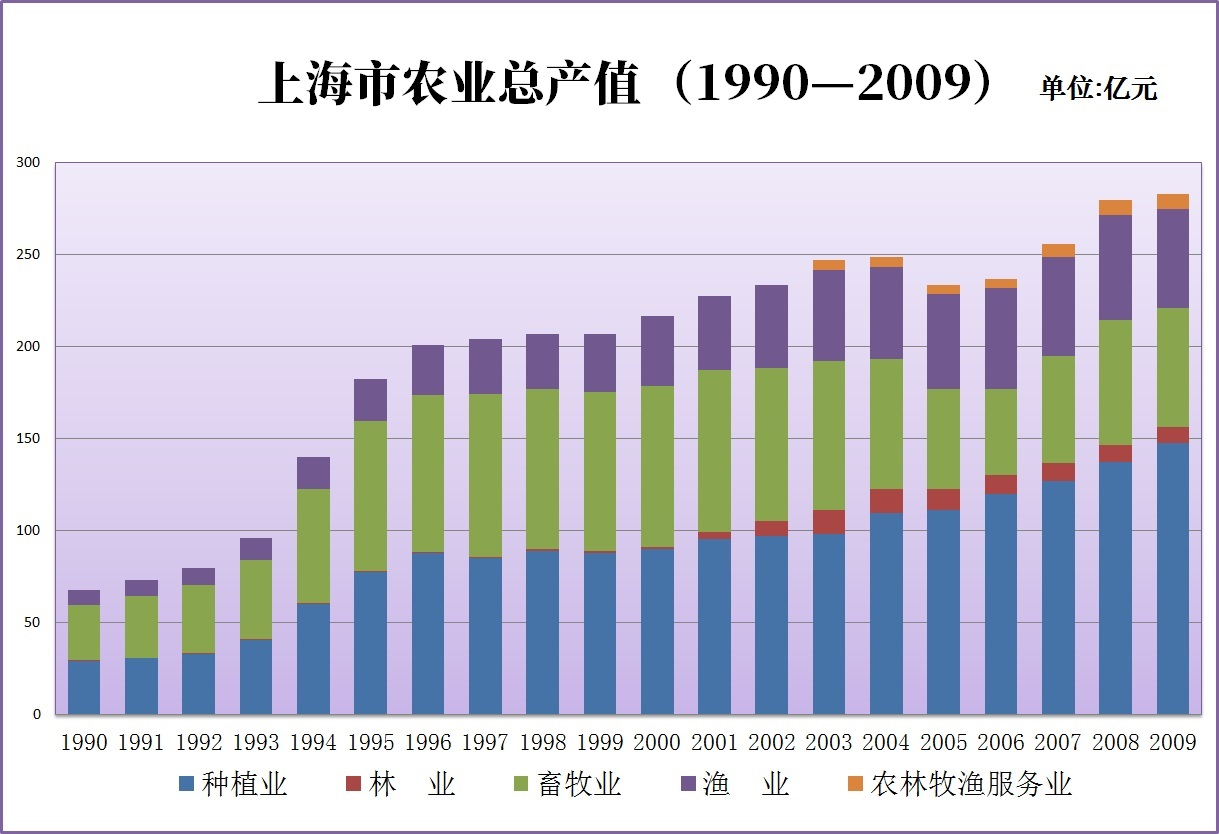 中文（中国大陆）: 上海农业总产值1990-2009